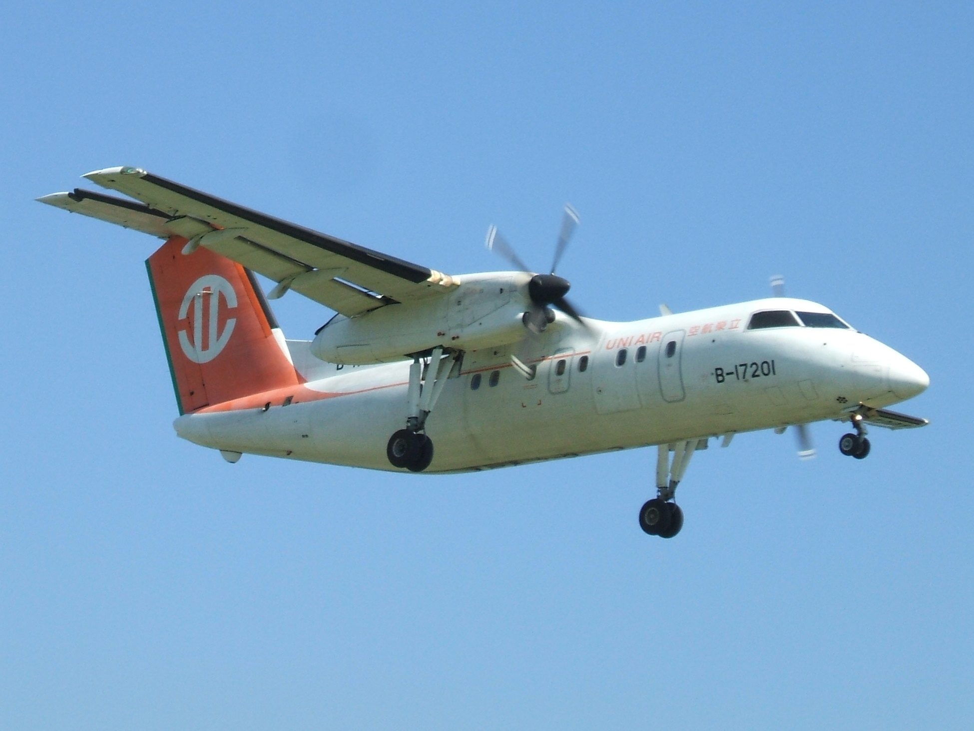 台湾島内の路線に就航している立栄航空DHC-8-200”B-17201”機、台北松山空港へ着陸親友中の機体を撮影